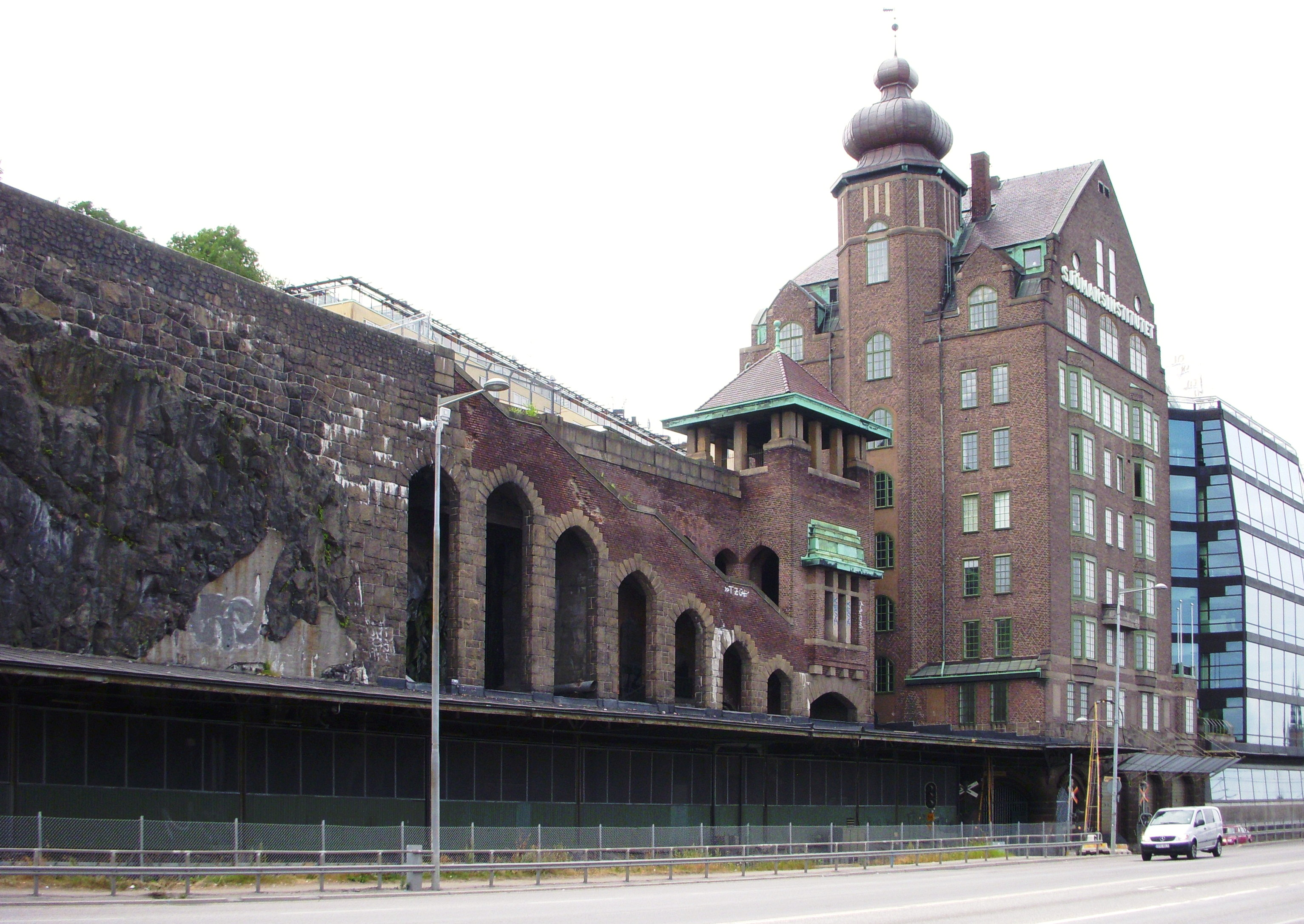 Saltsjöbanans gamla station Slussen med Sjömansinstitutets hus